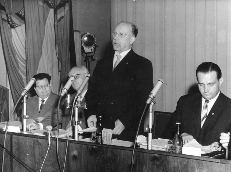 This description has been identified as biased or incorrect: Die Ausdrücke "Westberlinproblem", "Hauptstadt der Deutschen Demokratischen Republik", "Westberlin" und "imperialistische Länder" (sowie in diesem Zusammenhang "Westdeutschland") gehörten zum Sprachgebrauch des totalitären DDR-RegimesZentralbild/Kollektiv, 15.6.1961, Internationele Pressekonferenz Walter Ulbricht zum Friedensvertrag und zu Westberlin Fragen der Weltpresse zum Deutschen Friedensvertrag und zum Westberlinproblem beantwortete der Vorsitzende des Staatsrates der DDR und Erste Sekretär des ZK der SED, Walter Ulbricht, am 15.6.1961 auf einer Internationalen Pressekonferenz in der Hauptstadt der Deutschen Demokratischen Republik. Im grossen Festsaal des Hauses der Ministerien hatten sich etwa dreihundert Vertreter von Presse, Funk und Fernsehen der DDR, Westdeutschlands, Westberlins, aus sozialistischen und imperialistischen Ländern sowie aus jungen Nationalstaaten versammelt. UBz: Walter Ulbricht bei seinen Ausführungen. V.l.n.r.: Hermann Axen, Chefredakteur des "Neuen Deutschland"; Gesandter Kegel; Walter Ulbricht; Kurt Blecha